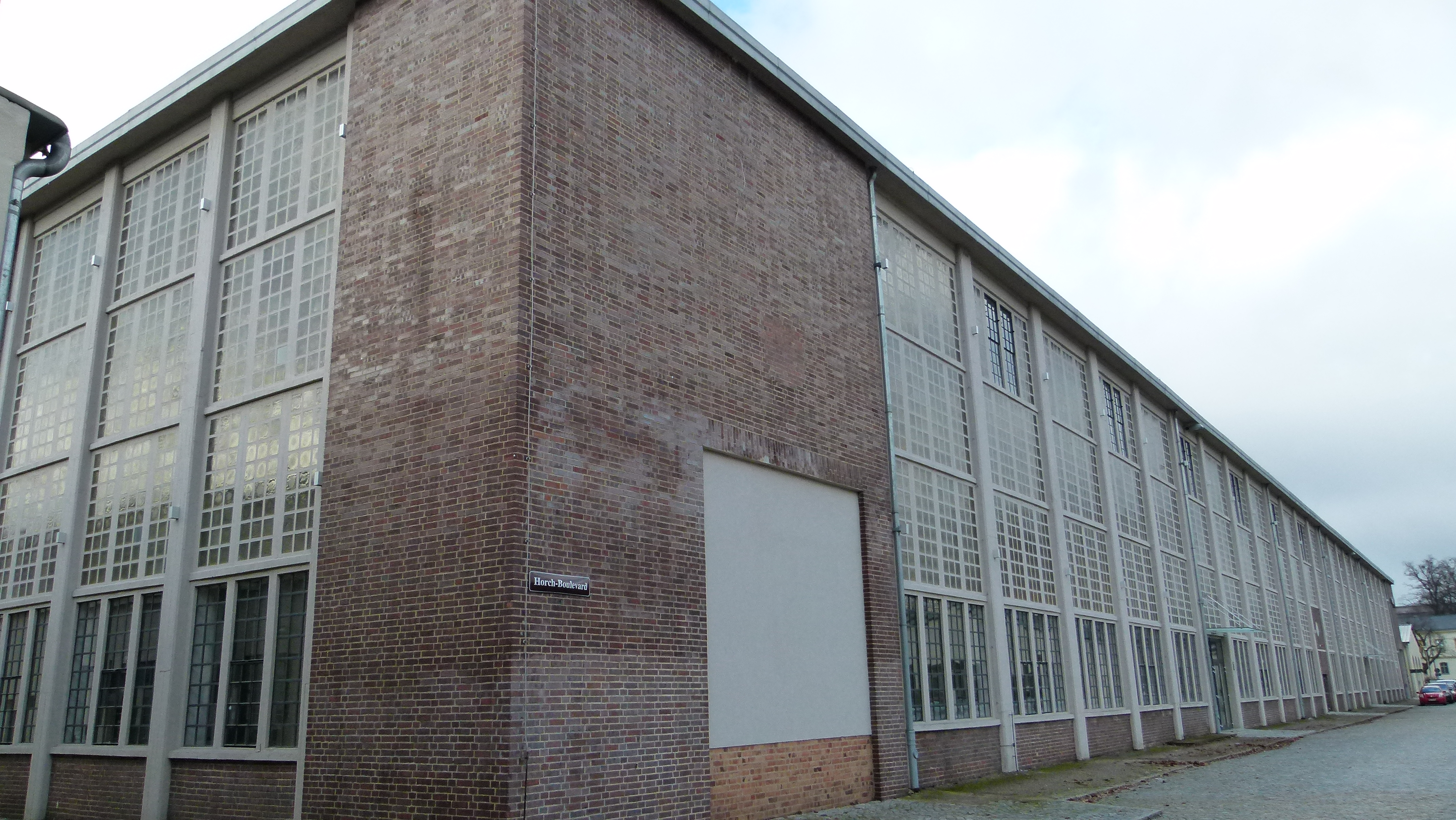 Denkmalgeschütztes Areal Zeitenströmung, Königsbrücker Straße 96, Dresden-Neustadt